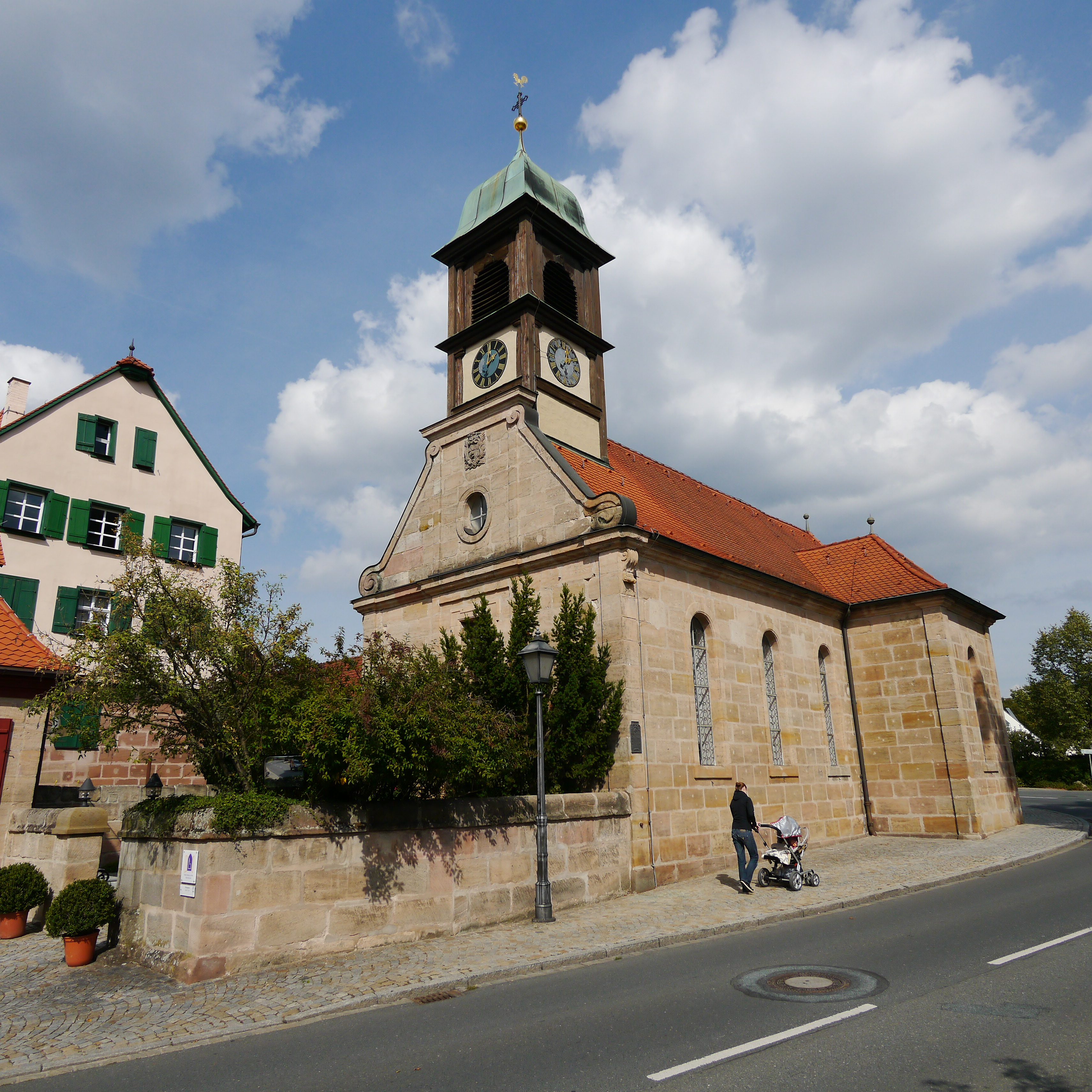 Ev. Pfarrkirche St. Magdalena in Behringersdorf